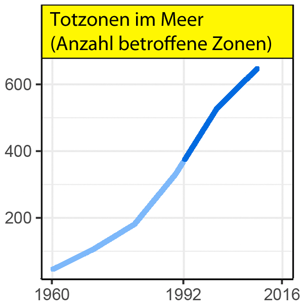 Totzonen der Meere nach „World Scientists’ Warning to Humanity: A Second Notice“ 2017